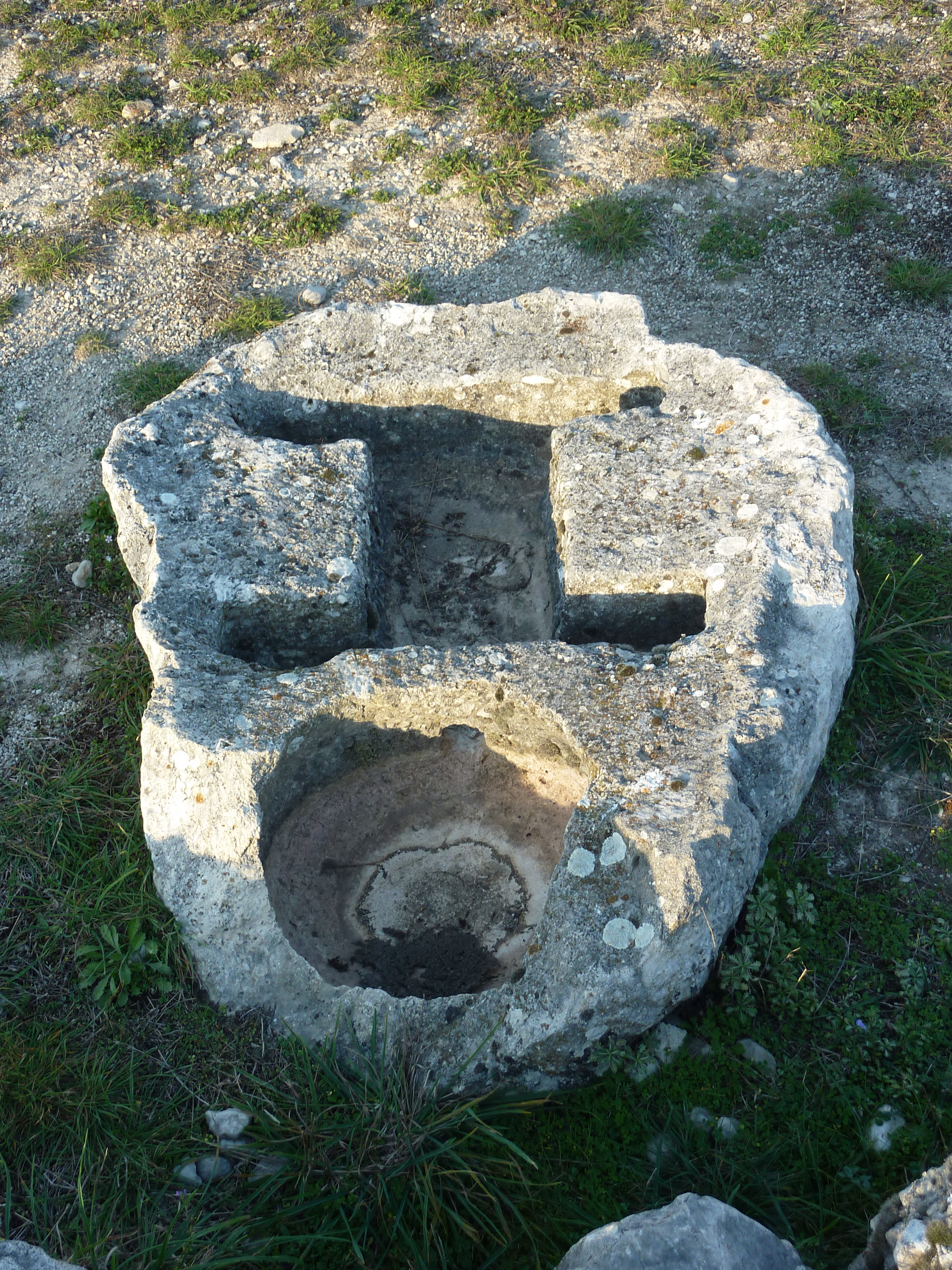 Peltuinum